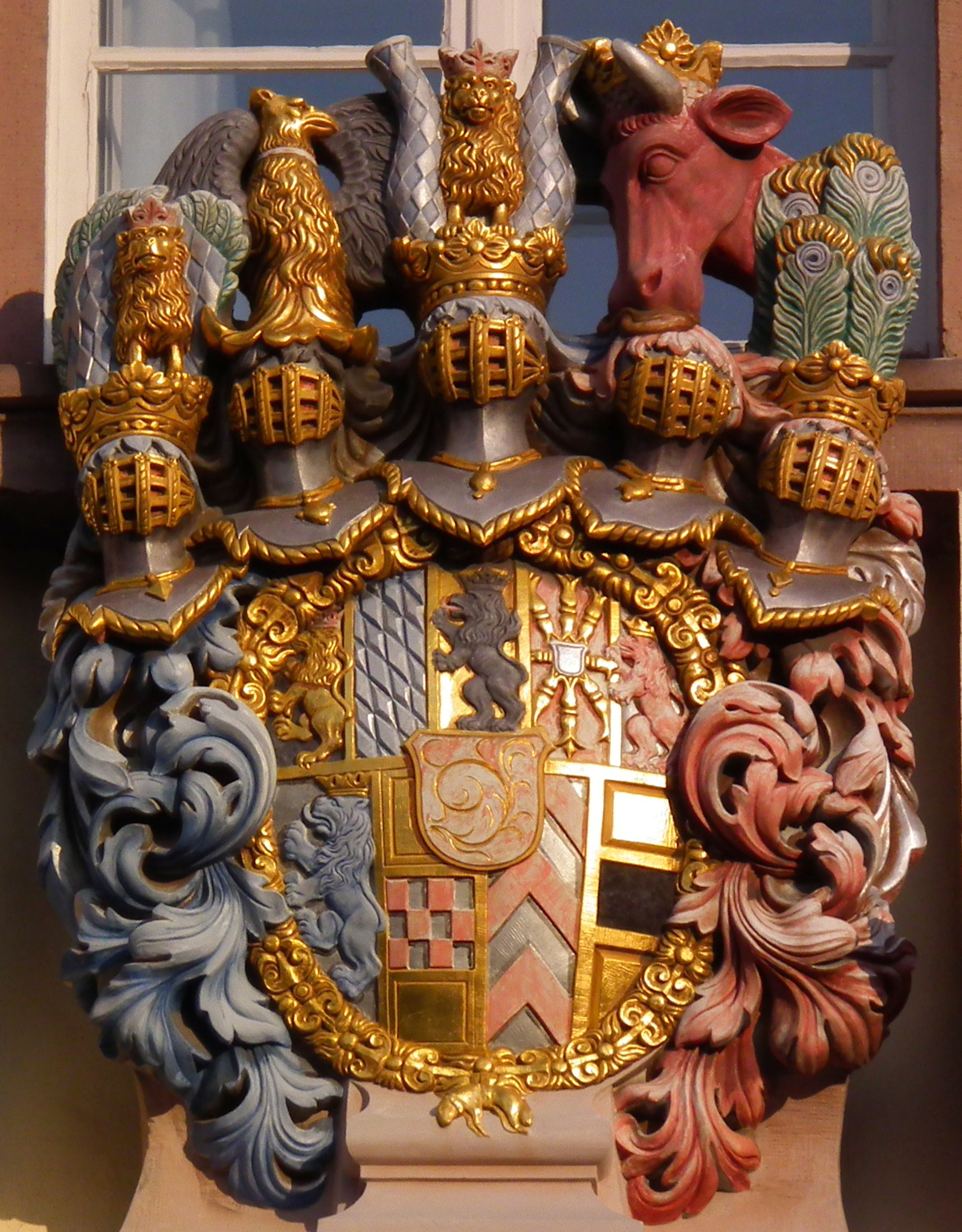 Rathaus in Heidelberg (Baden-Württemberg, Deutschland). Kurpfälzisches Allianzwappen: Obere Reihe: Kurpfalz, Haus Wittelsbach, Jülich, Kleve, BergUntere Reihe: Veldenz, Mark, Ravensberg, MoersHerzschild: RegalienschildUm das Wappen: Collane des Ordens vom Goldenen VliesHelme: Pfalz-Bayern, Jülich, Pfalz-Bayern, Cleve und Mark, Berg